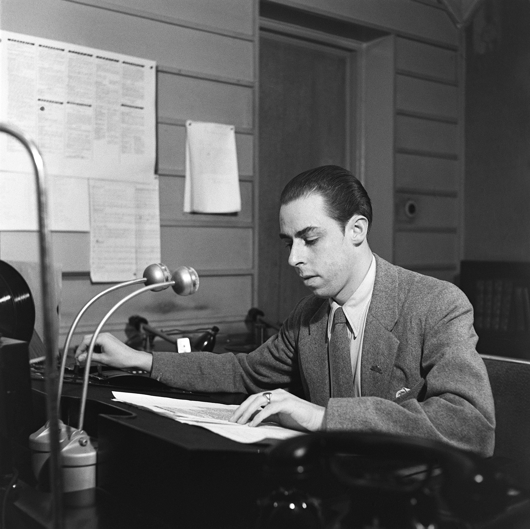 Yleisradion kuuluttaja Carl-Erik Creutz työssään radion studiossa. Kuvausajankohta arvioitu vuosikymmenen tarkkuudella. Tiedätkö jotain tästä kuvasta? Jätä kommentti tai ota yhteyttä sähköpostitse: Tutustu Ylen arkistosisältöihin: Fler skatter från Yles arkiv: More about Yle, the Finnish Broadcasting Company